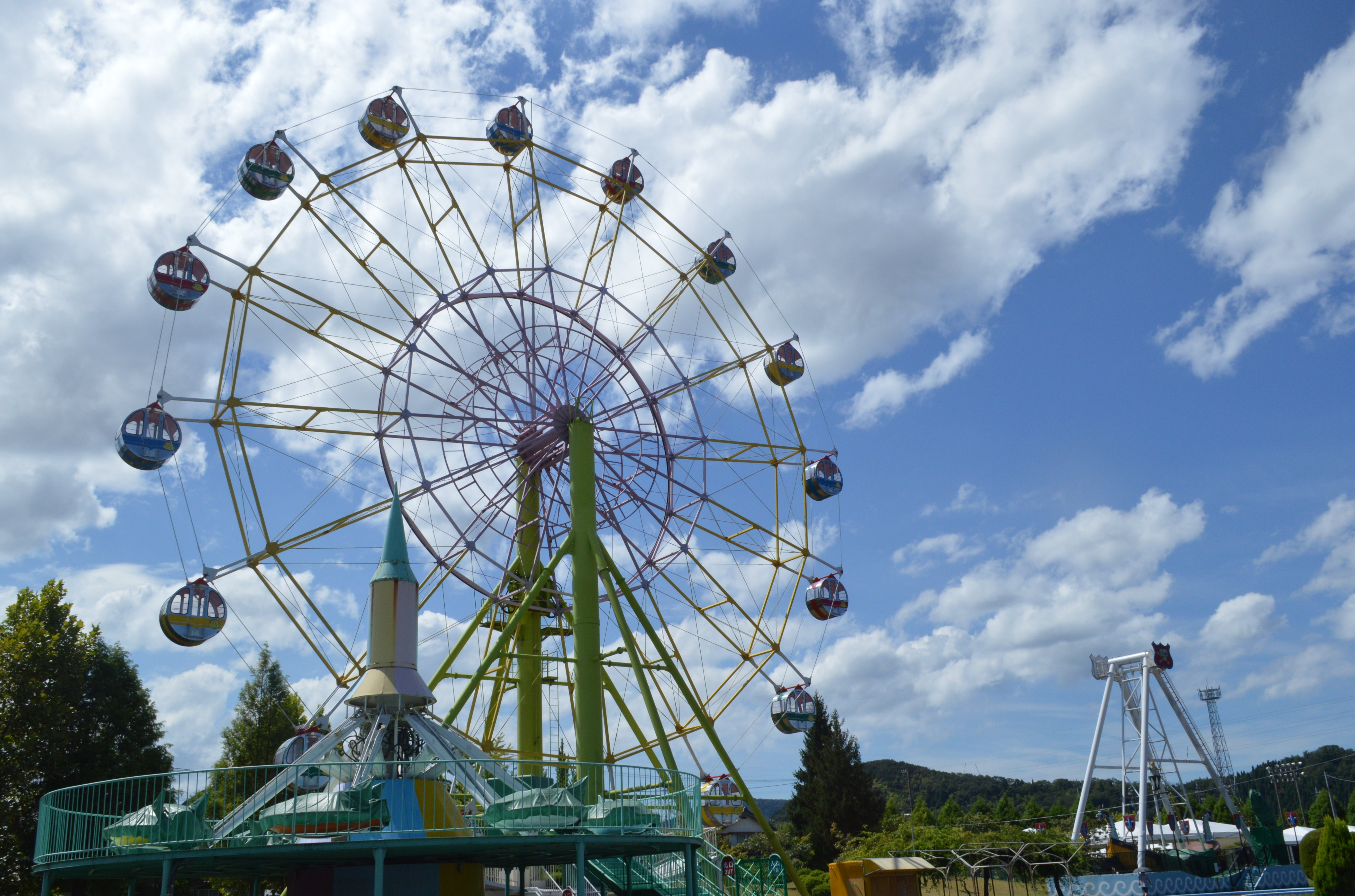 福井県越前市の武生中央公園。